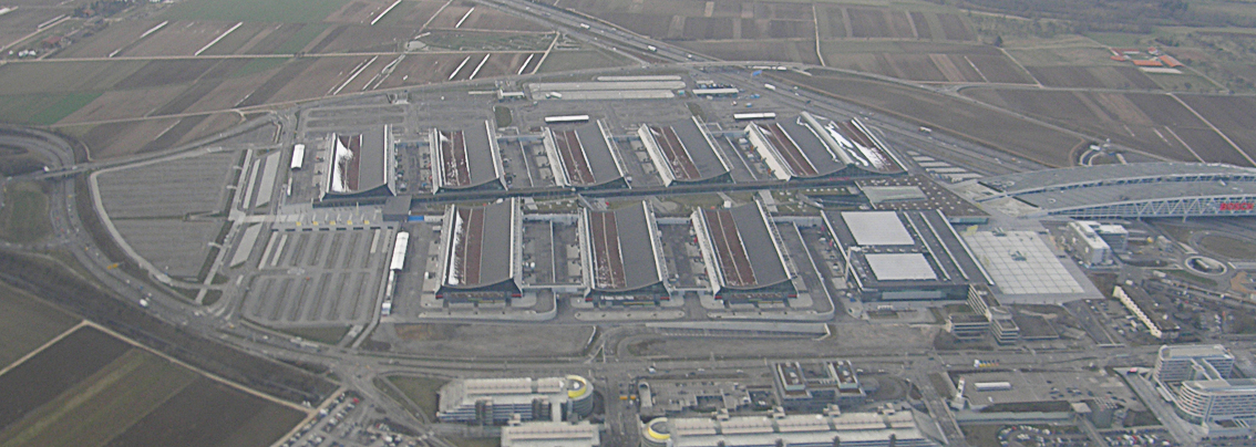 Die Messe Stuttgart aus der Luft